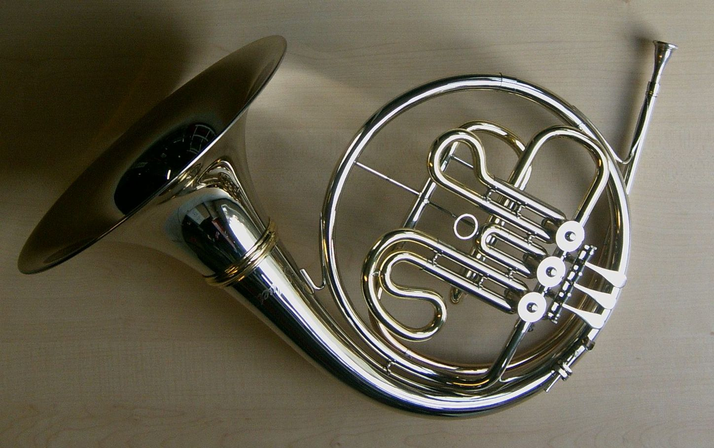 B-Waldhorn in Vorderansicht